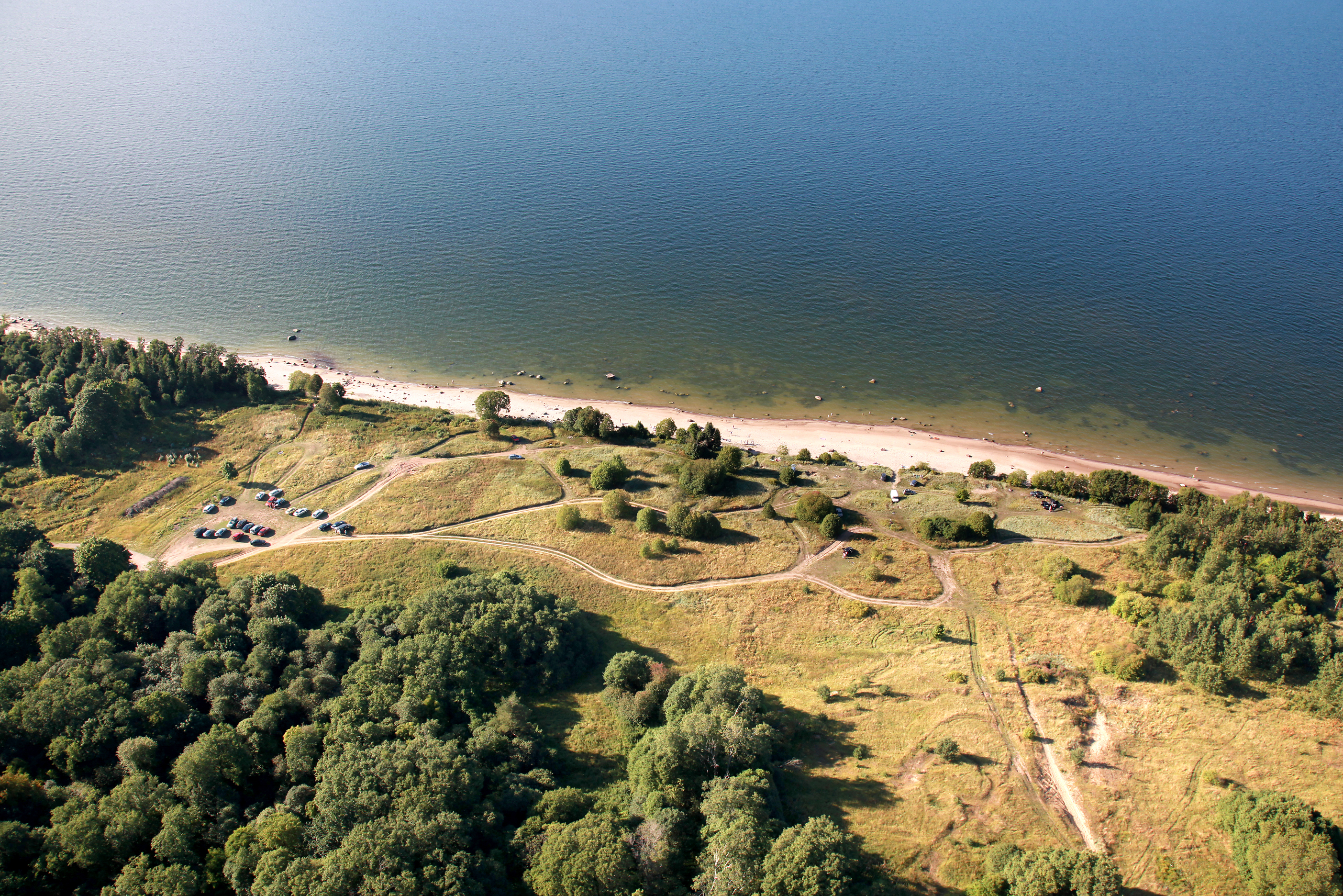 Aa ranna aerofoto